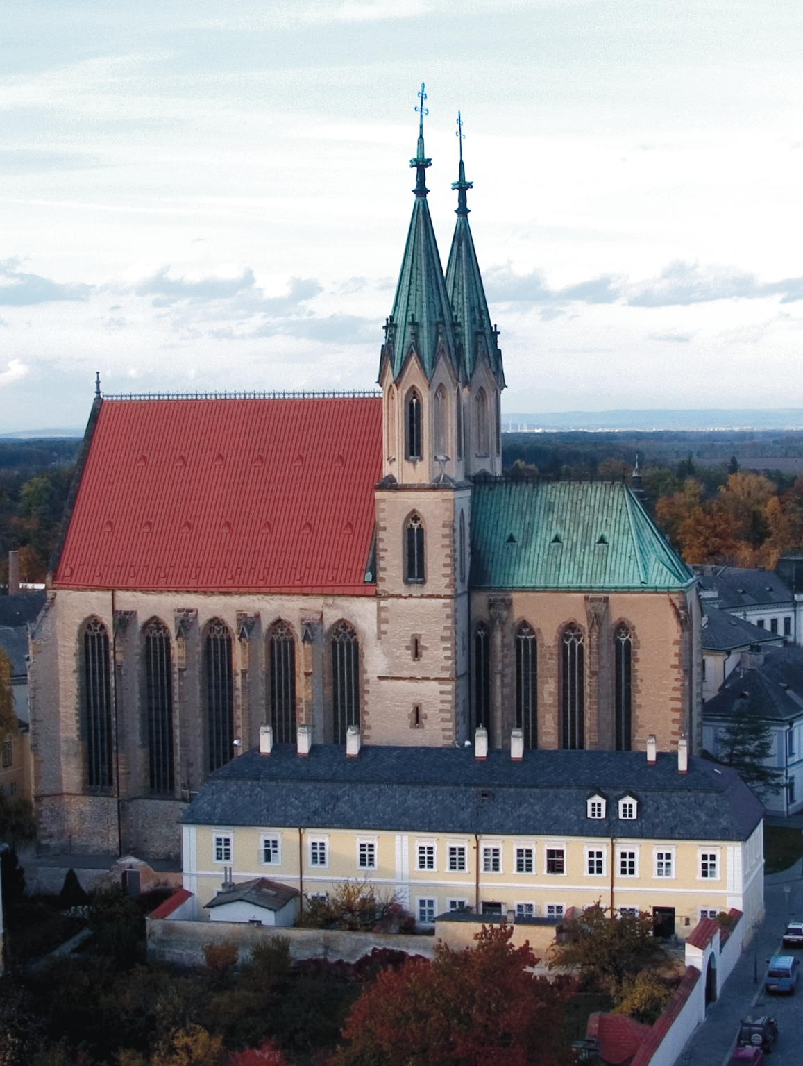 Kostel sv. Mořice (Kroměříž), Stojanovo 1139, Kroměříž, Kroměříž.